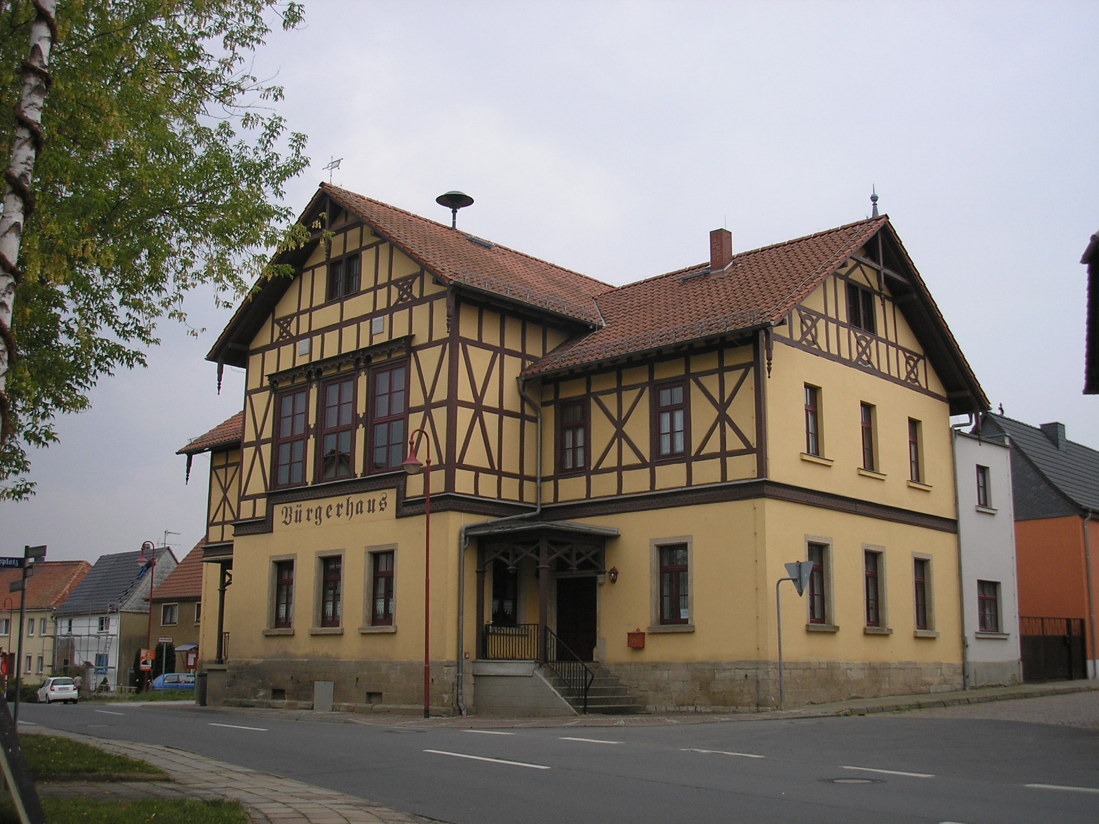 Das Bürgerhaus in Hardisleben (Thüringen).